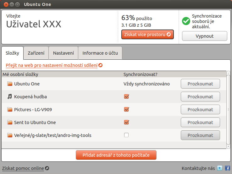 Standardní klient pro Ubuntu One v Ubuntu 12.04 LTS